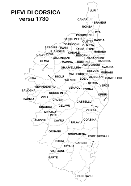 Pievi di Corsica versu 1730